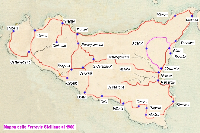 Mappa della rete ferroviaria della Sicilia nel 1900.